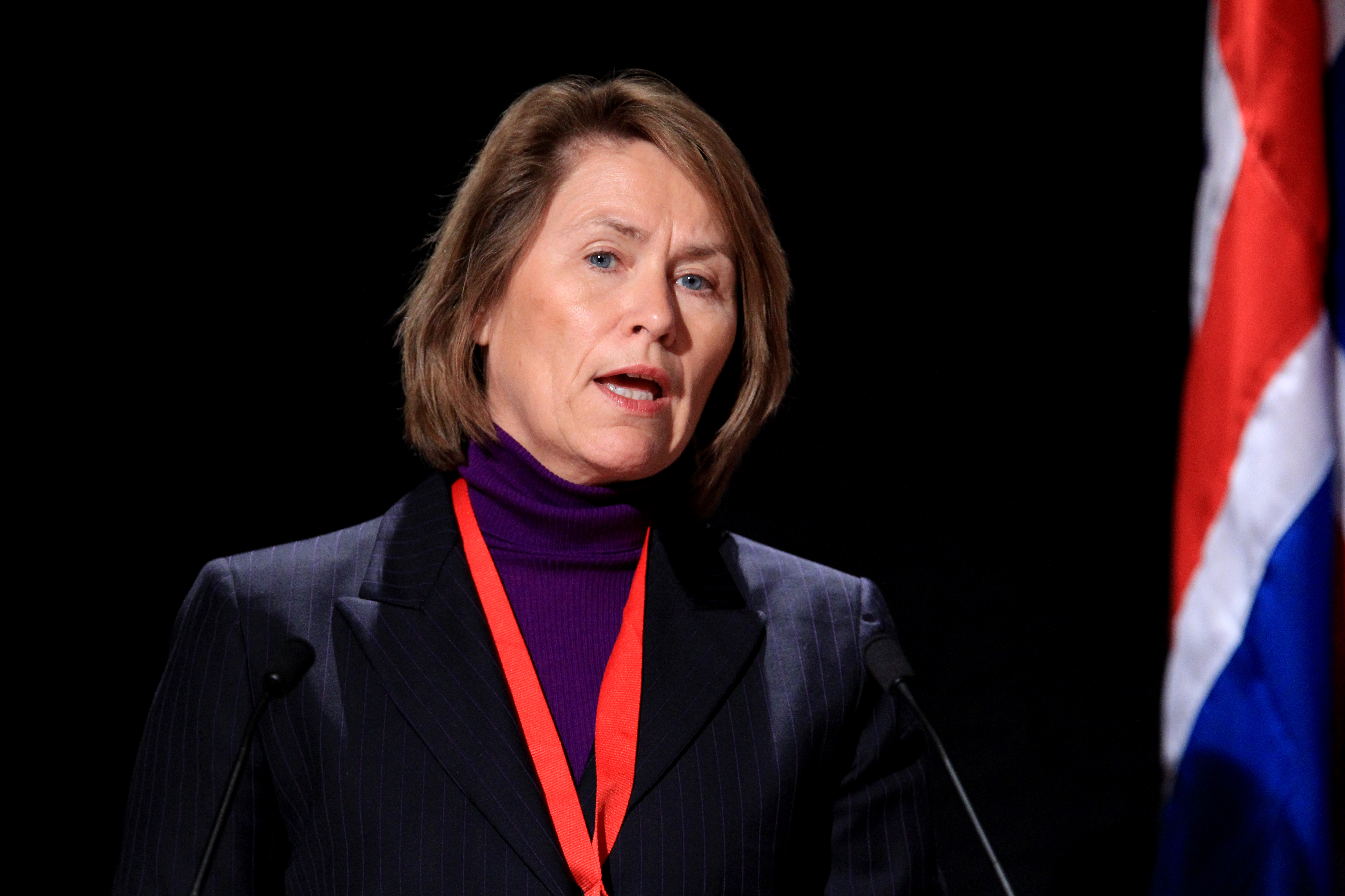 Norges försvarsminister Grete Faremo vid Nordiska Rådets session i Reykjavik. 2010-11-03.